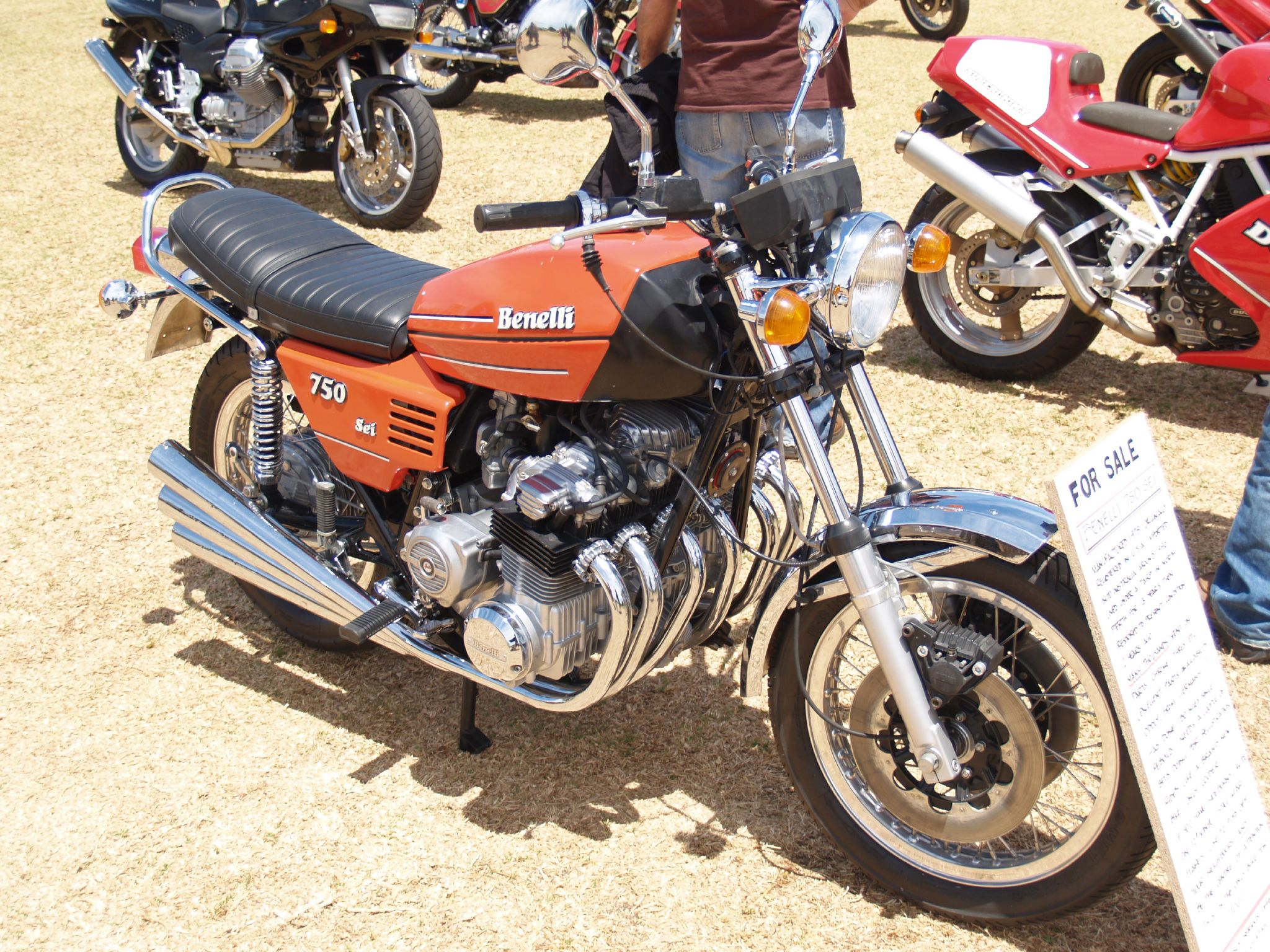 Benelli Sei 750